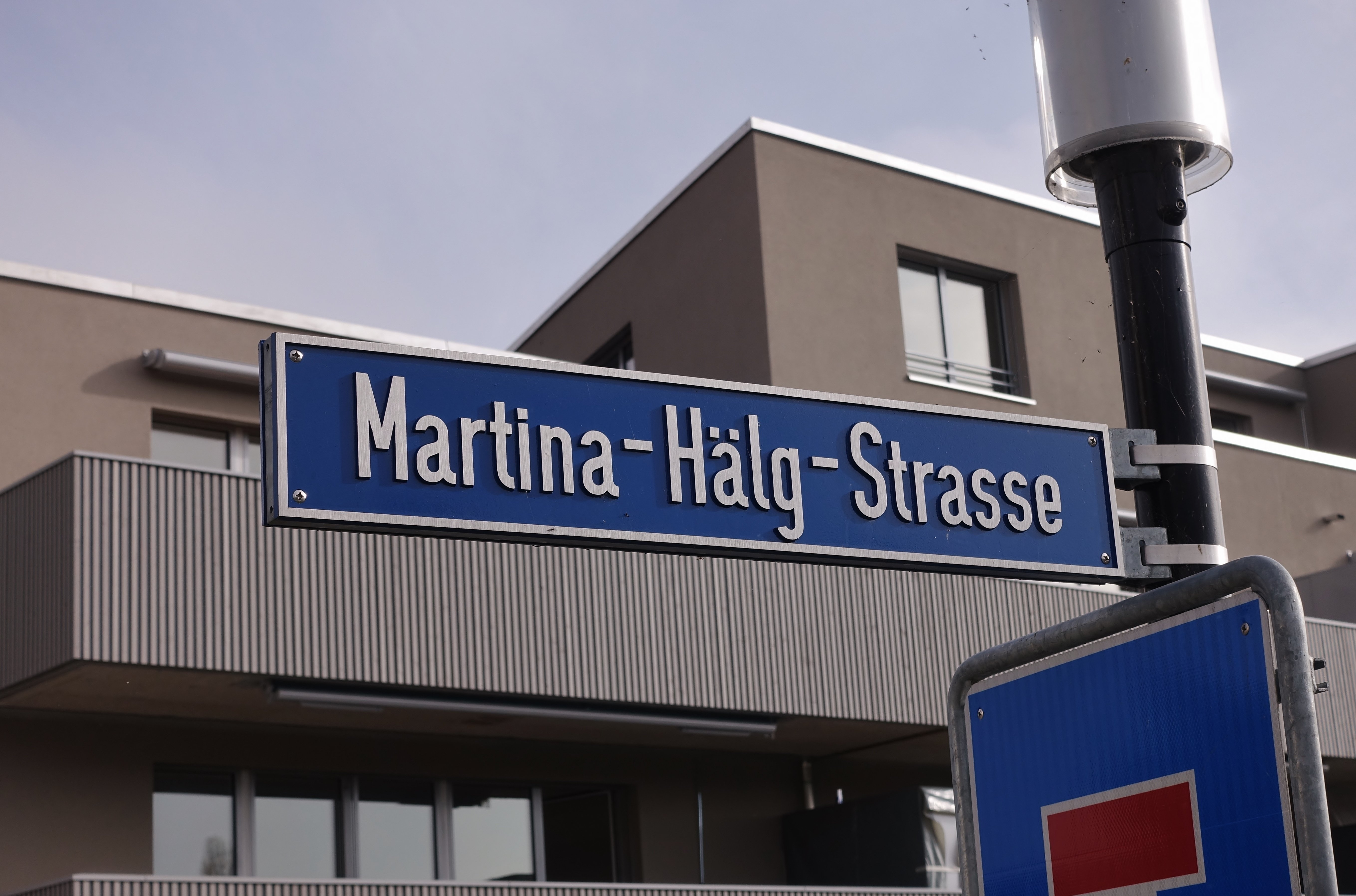 Strassentafel der Martina-Hälg-Strasse in Romanshorn am Bodensee (Kanton Thurgau)